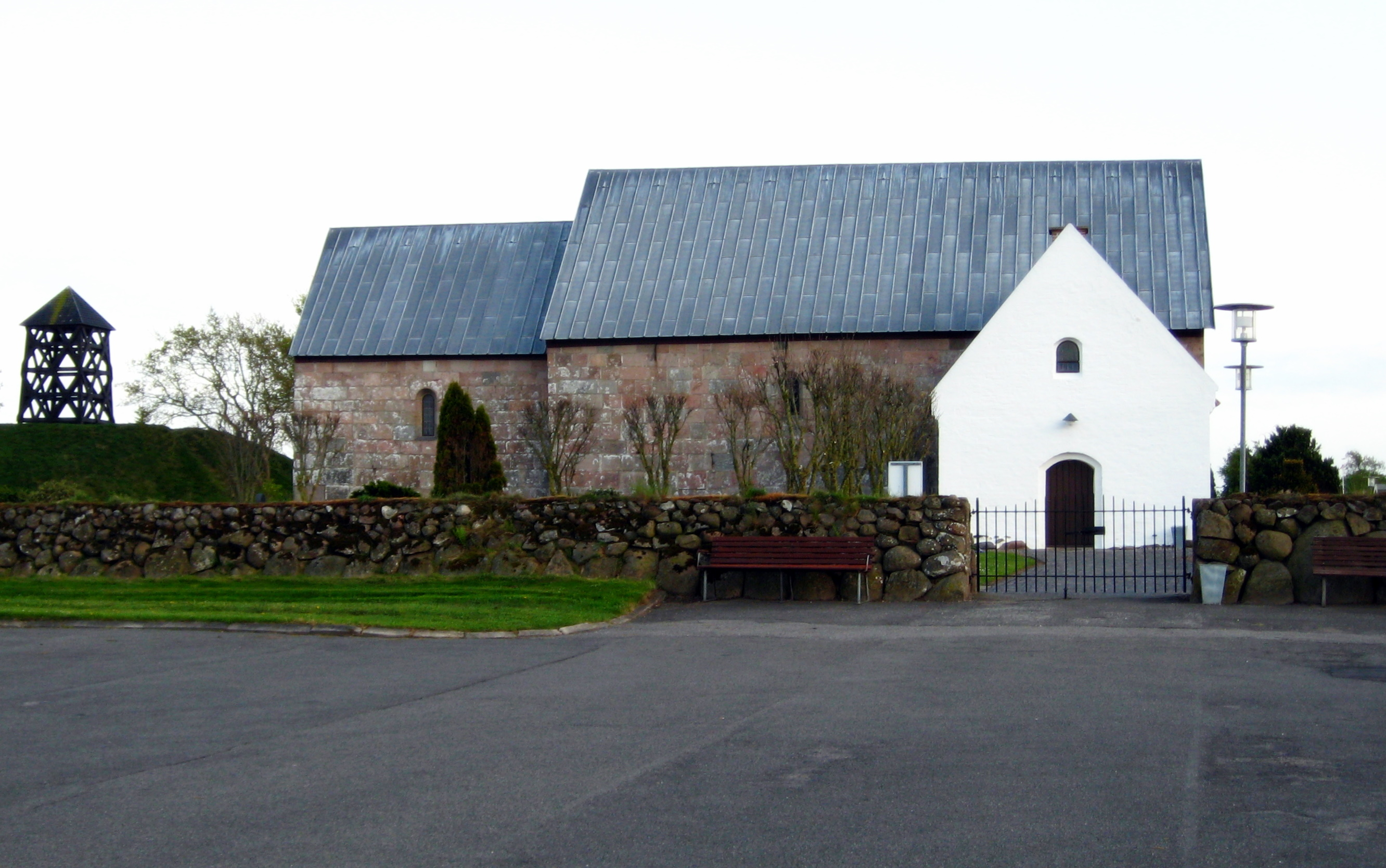 Serritslev Kirke, Brønderslev Kommune